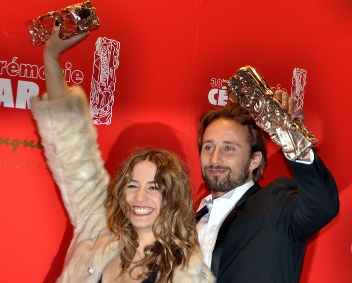 Izia Higelin et Matthias Schoenarts à la cérémonie des César